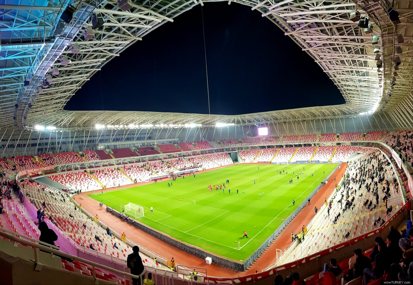 Yeni 4 Eylül Stadyumu